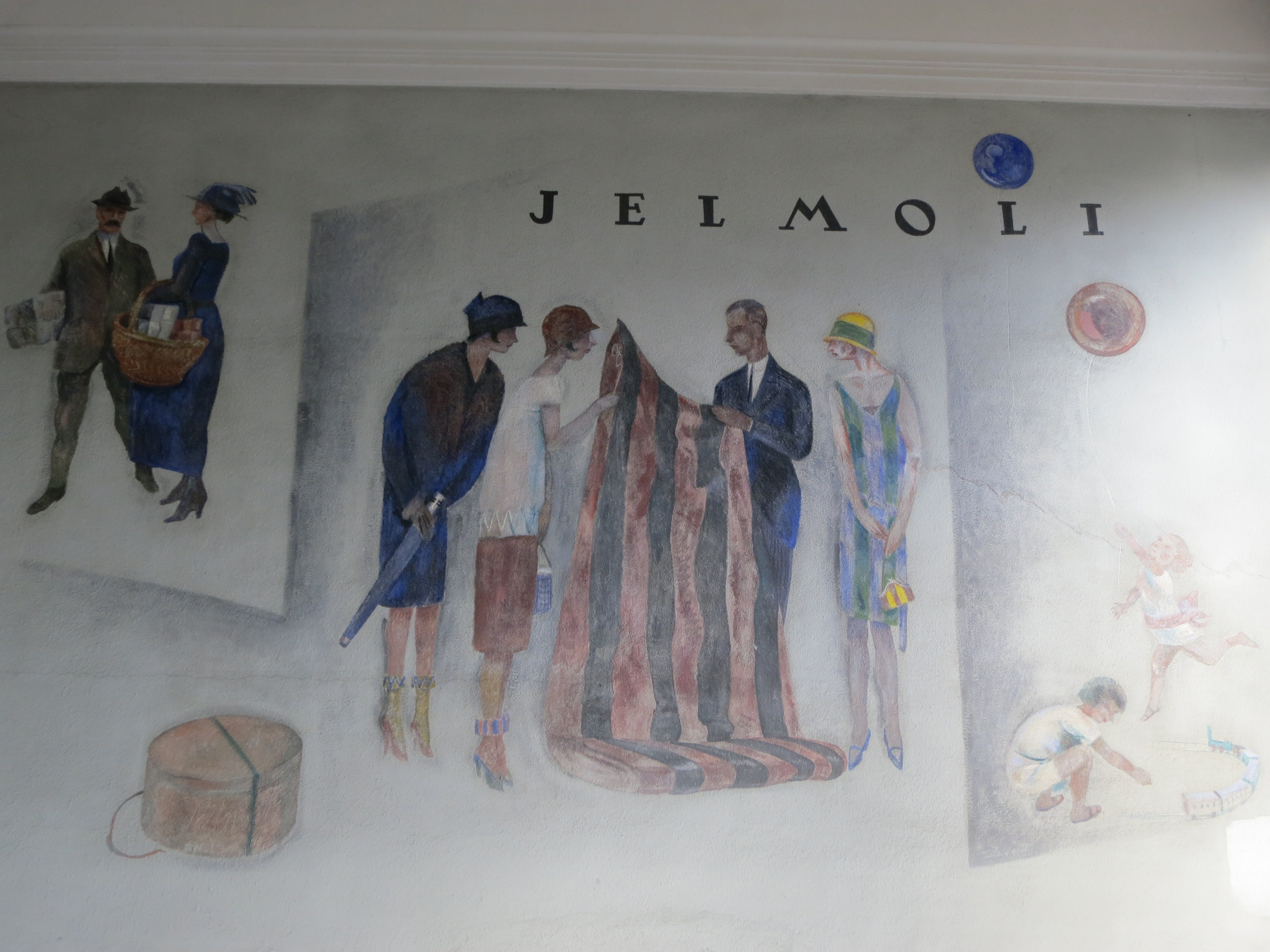 Wandmalerei Otto Baumberger 1926, Bahnhofshalle, Zürich-Wiedikon, Schweiz